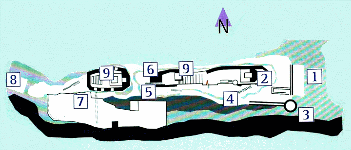 Burg Wasigenstein, plan (Grundriss).